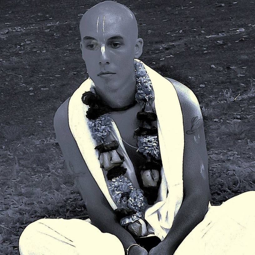 Hamilton is also a full-time monk missionary and initiated as a disciple of His Holiness Guru Prasad Swami ISKCON